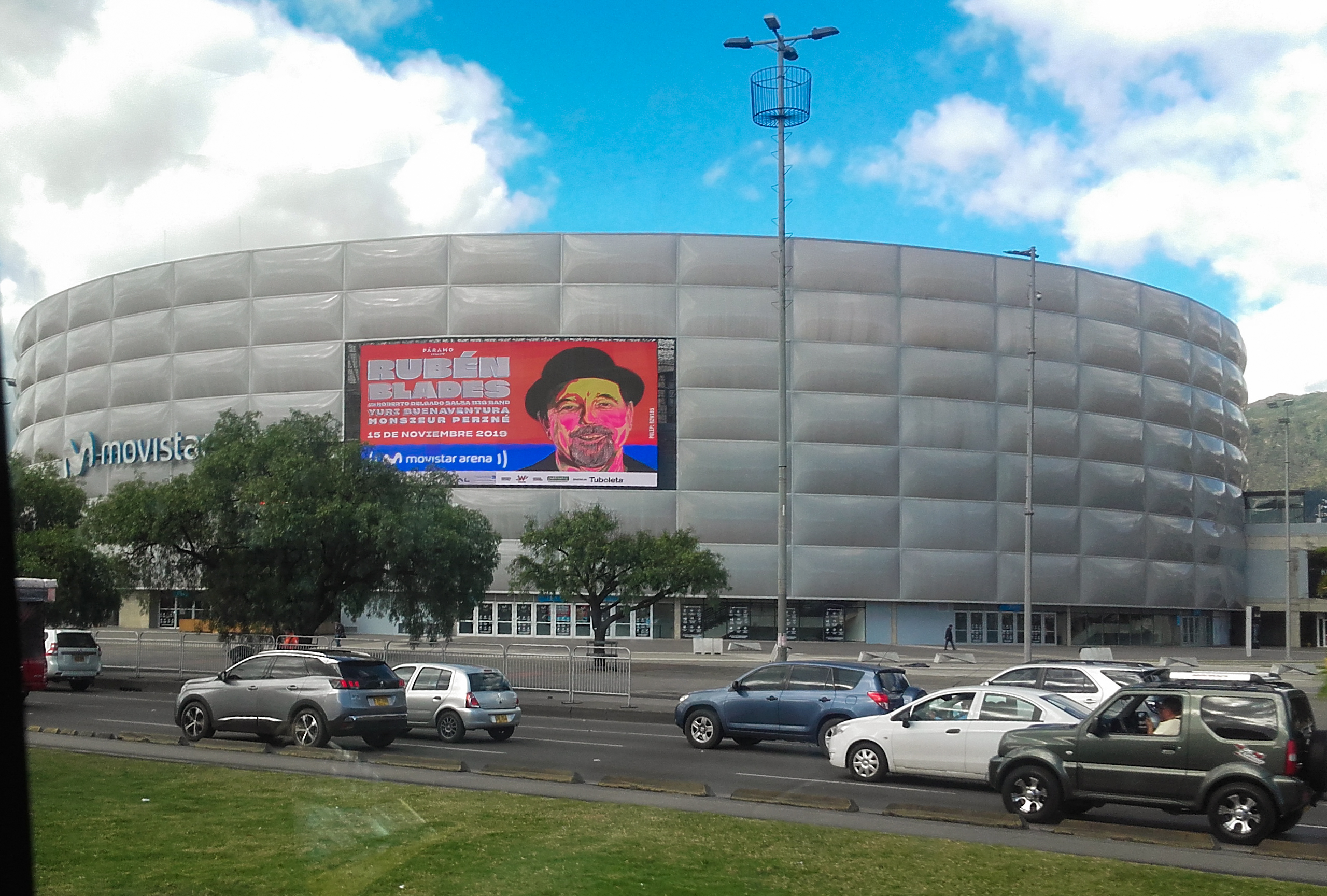 dnnrntmldle